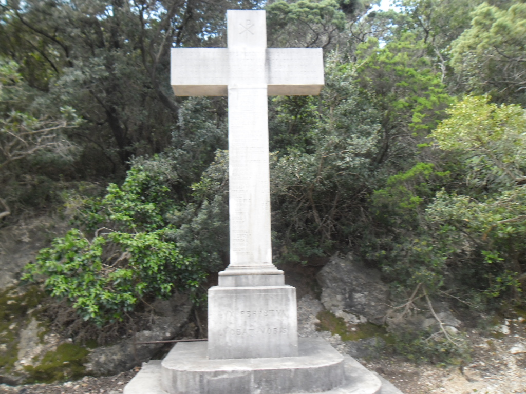 Tritonov križ na otoku Lokrumu